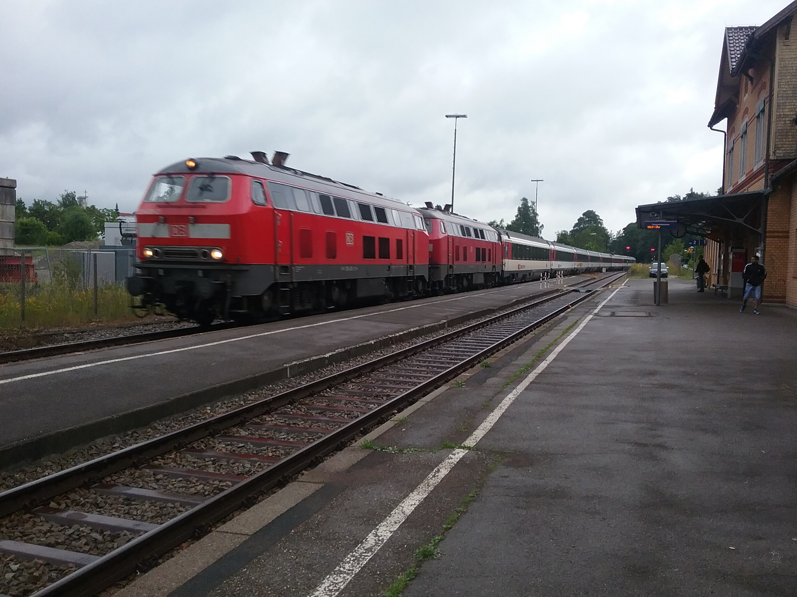 Durchfahrender Eurocity 192 München–Buchloe–Memmingen–Lindau–Bregenz–St. Margrethen–St. Gallen–Gossau SG–Wil–Winterthur–Zürich–Lenzburg–Aarau–Sissach–Liestal–Basel im Bahnhof Wangen (Allgäu)